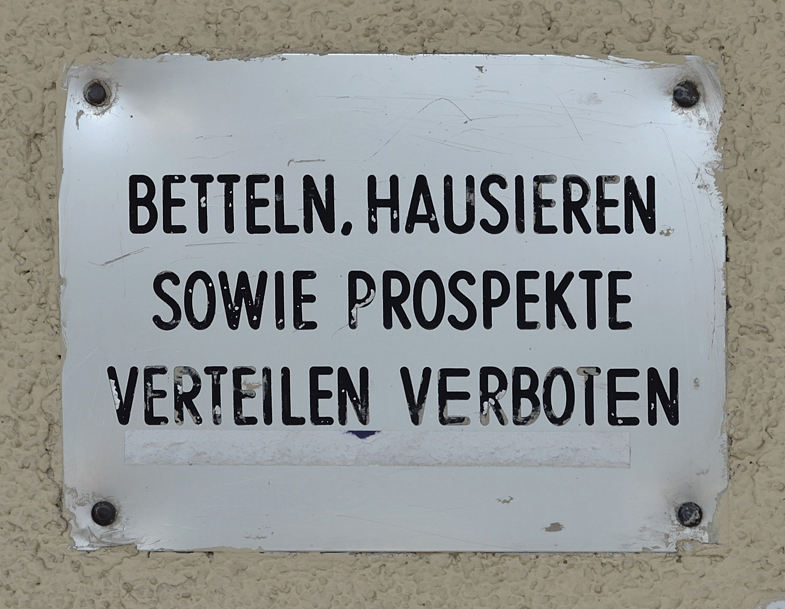 Verbotsschild am Eingang von Wiedner Gürtel 46: Betteln, Hausieren sowie Prospekte verteilen verboten. (Als Prospekte Verteilen noch kein profitables Gewerbe war)